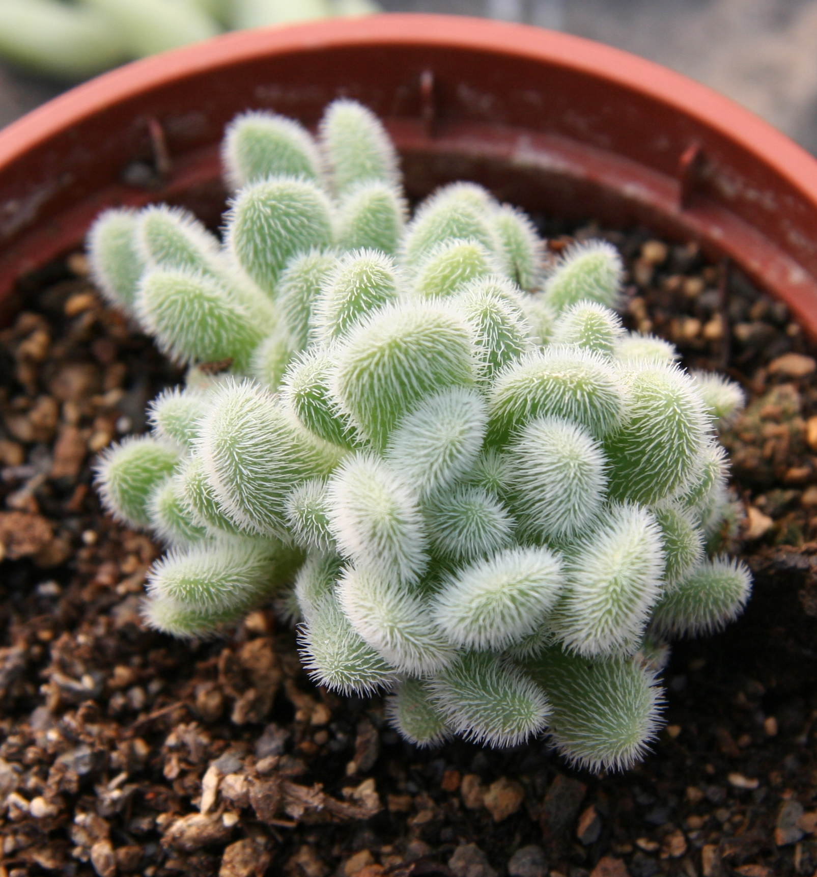 Sedum hintonii in Kultur bei Kakteen-Haage in Erfurt